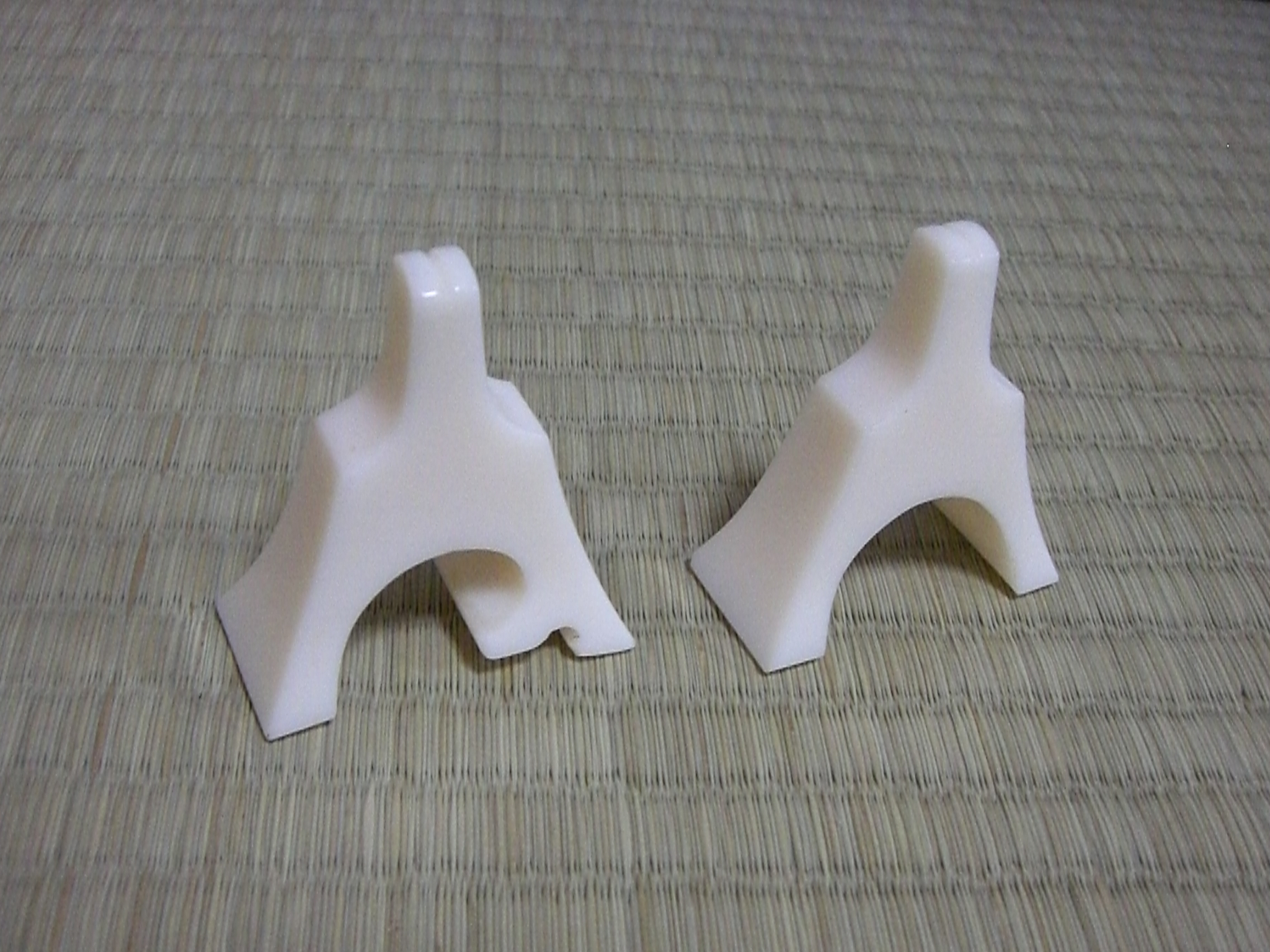 箏の柱（じ） ji- of Japanese Koto (sou)